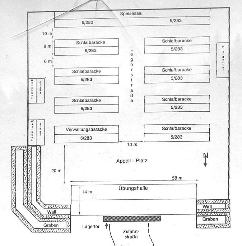 Grundriss des ehemaligen Reichsarbeitsdienstlagers am Schwarzen Moor in der Rhön. Teil einer Infotafel.